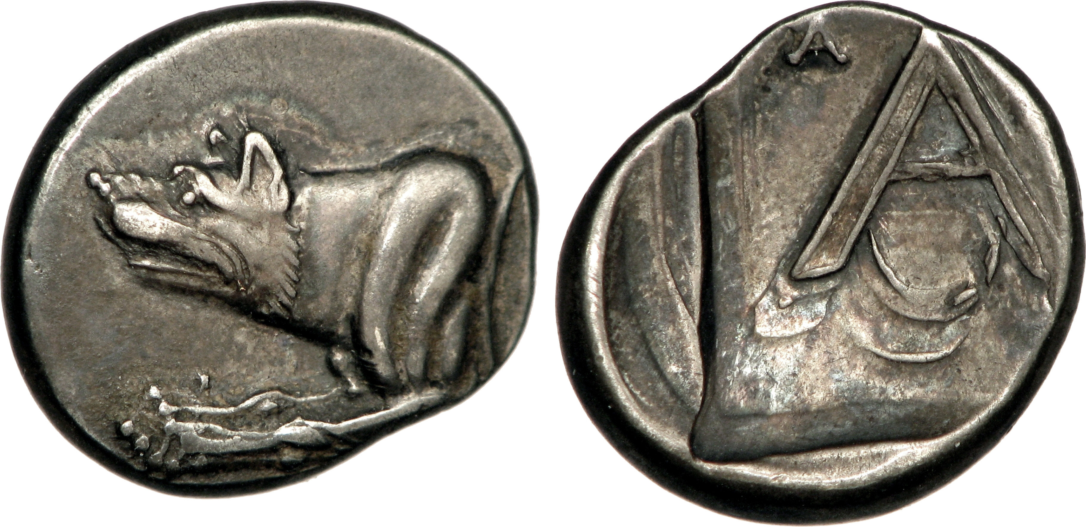 Nom de l'atelier : Argolide, Argos Métal : argent Diamètre : 15mm Axe des coins : 9h. Poids : 2,76g. Description avers : Protomé de loup à gauche. Description revers : A dans un carré creux ; au-dessous, croissant évidé. Légende revers : A-R. Traduction revers : (Argos).